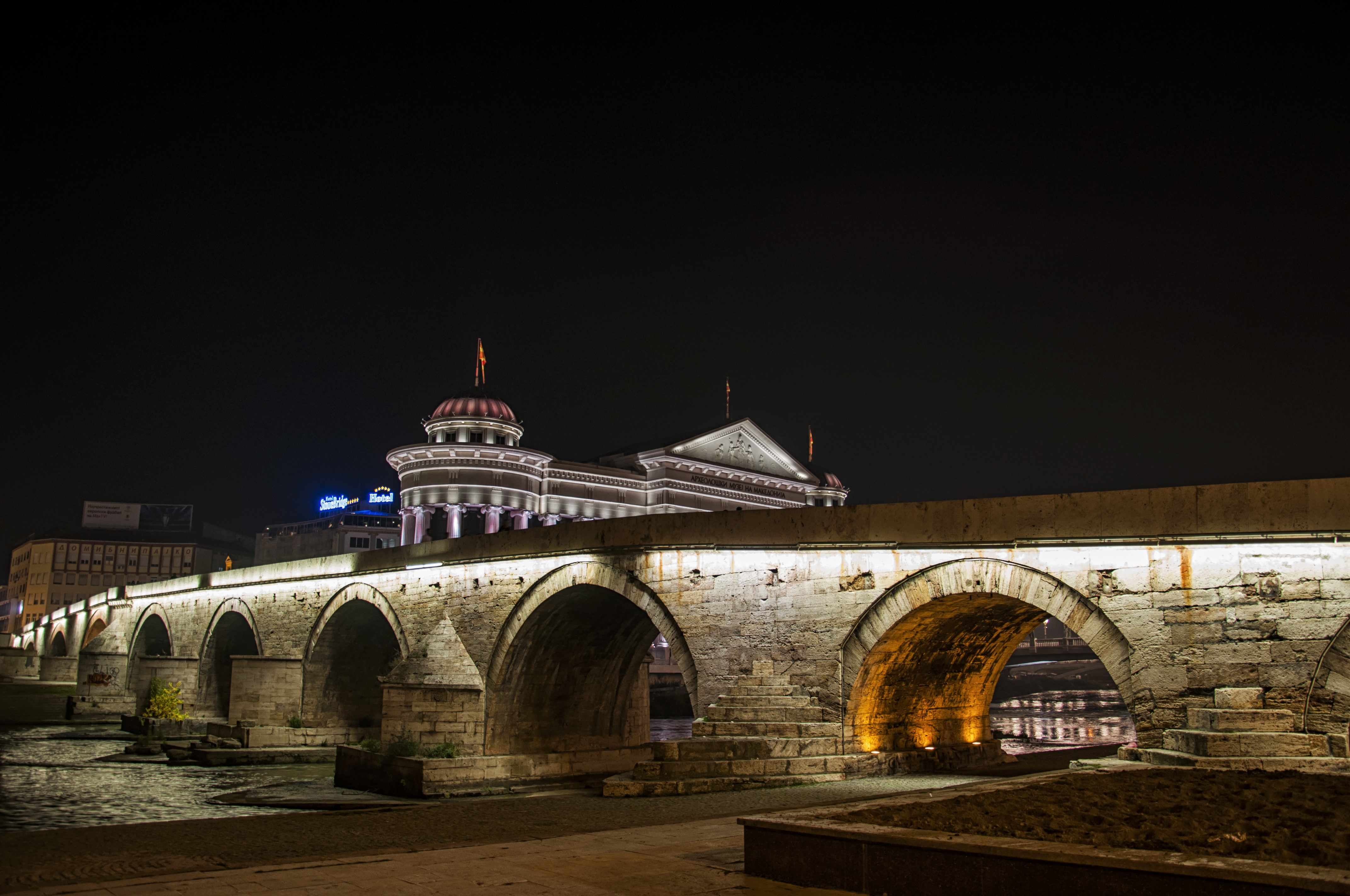 Камениот мост во Скопје сликан преку ноќ со Археолошкиот музеј